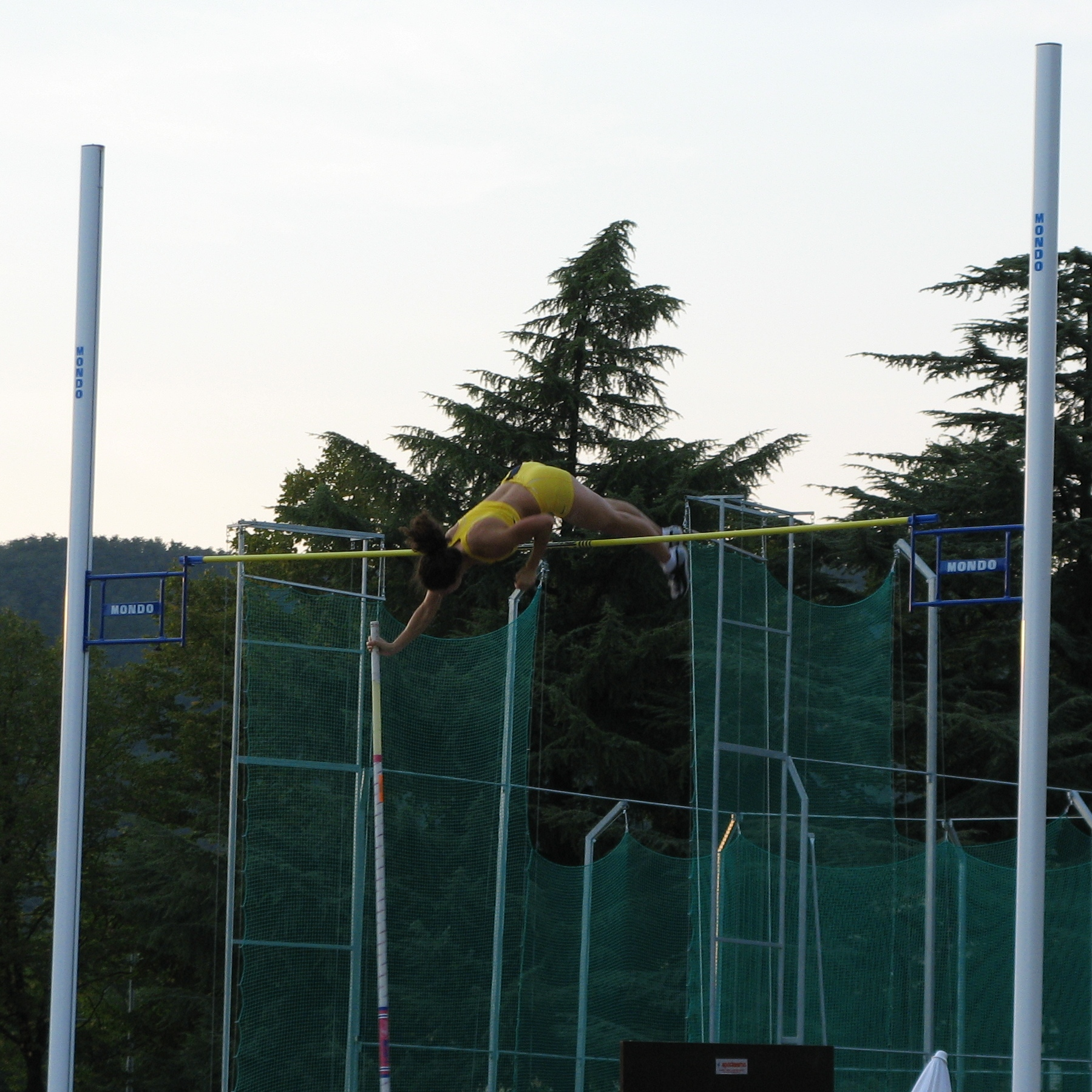 foto rappresentante Anna Giordano Bruno a Gorizia